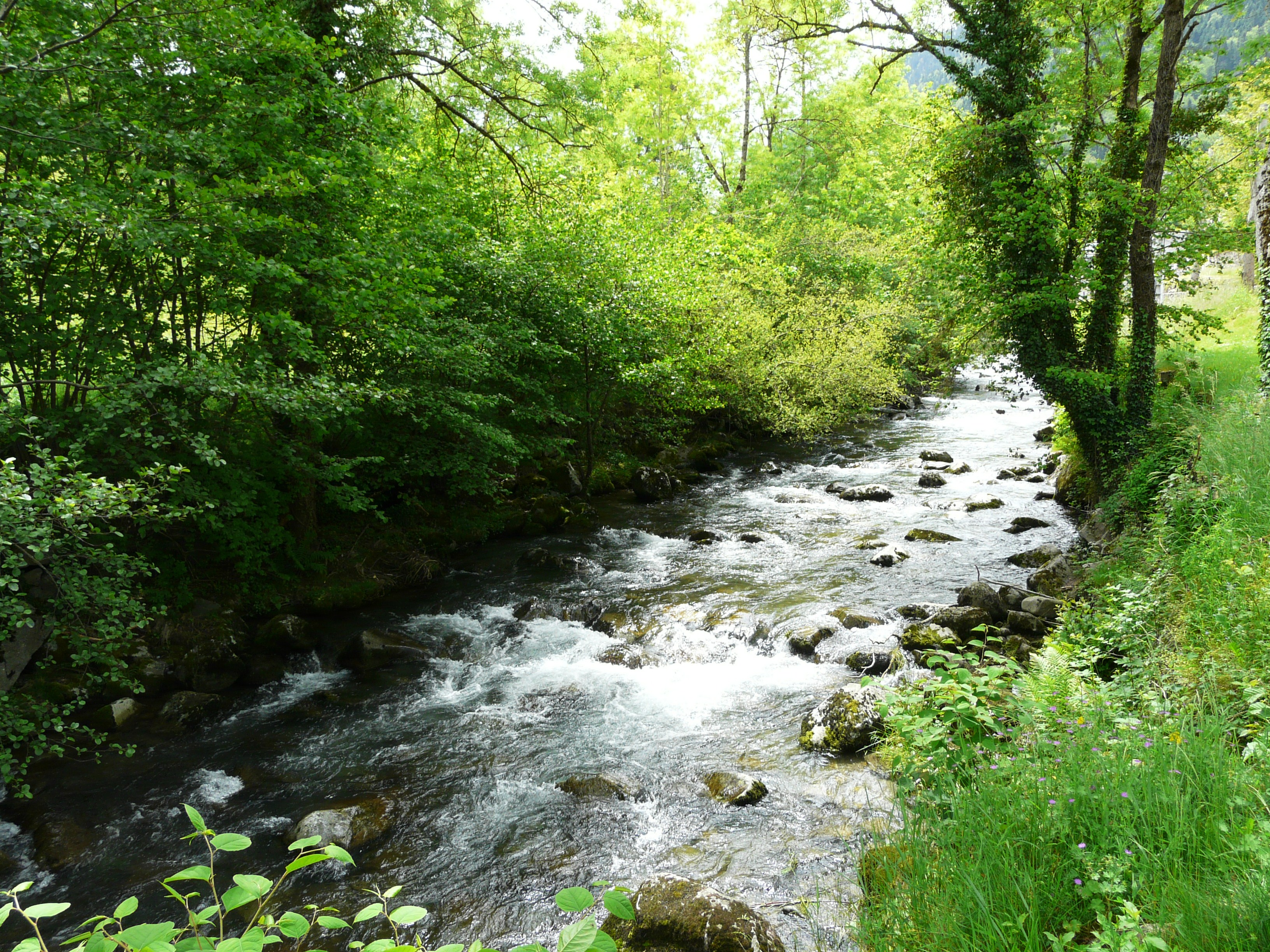 La Neste du Louron à Bordères-Louron, Hautes-Pyrénées, France.